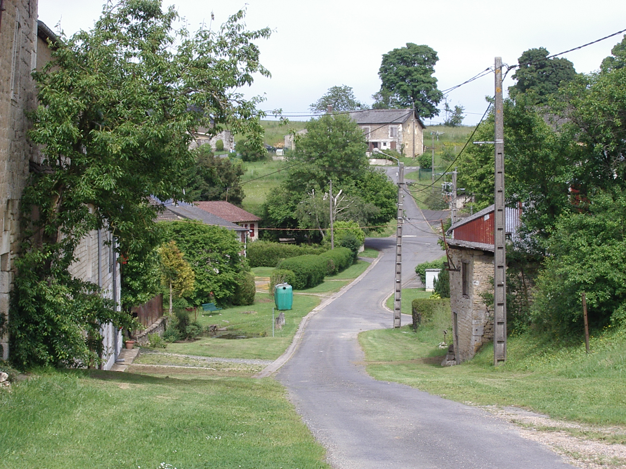 Barbaise est une commune française, située dans le département des Ardennes et la région Champagne-Ardenne